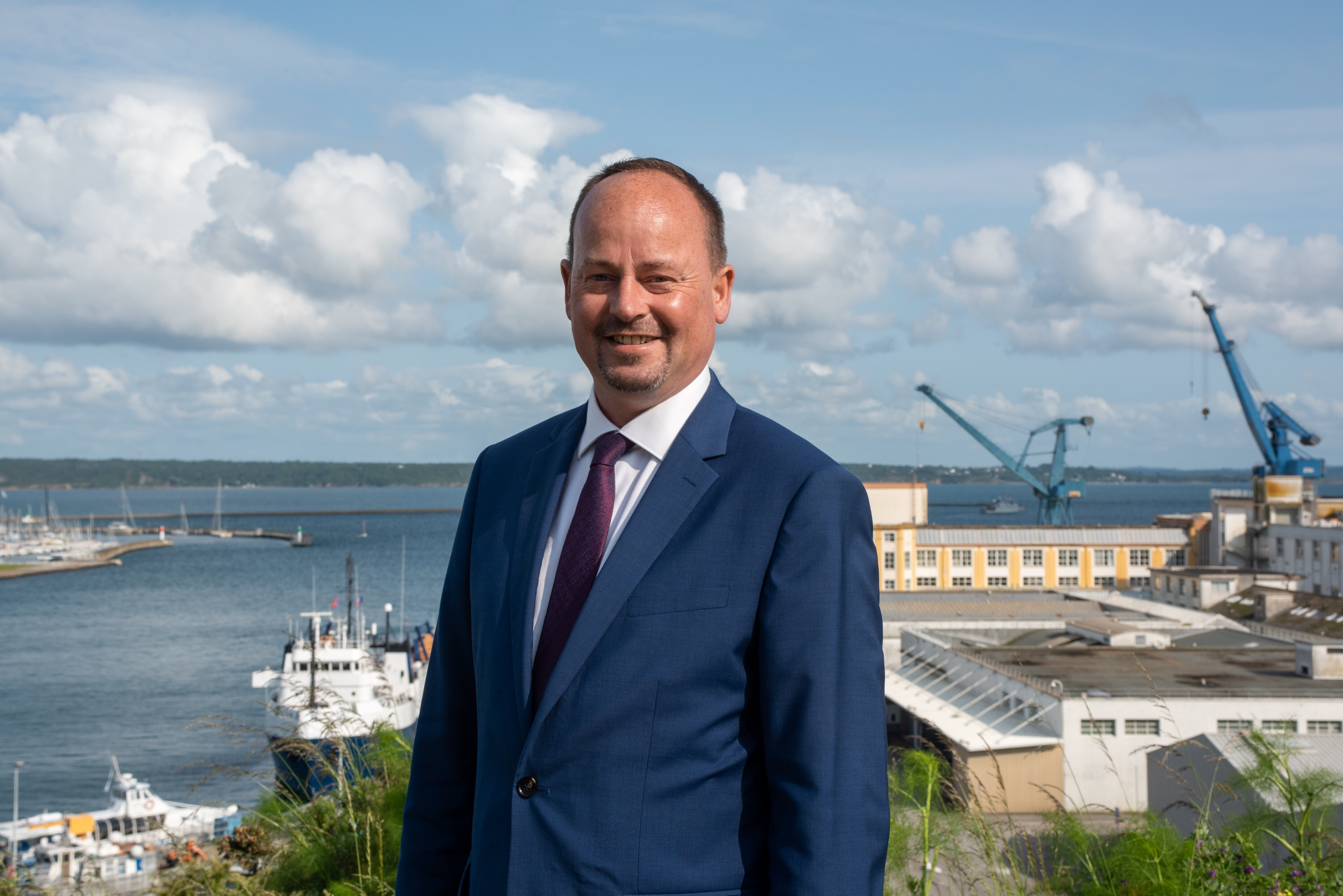 Marc Coatanéa au Jardin des Explorateurs à Brest